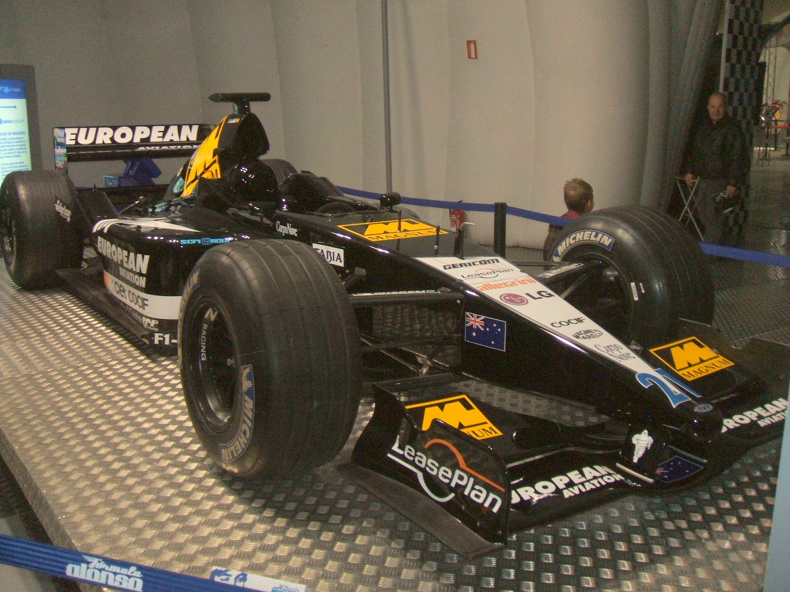 Tampilan samping dari mobil Minardi PS01